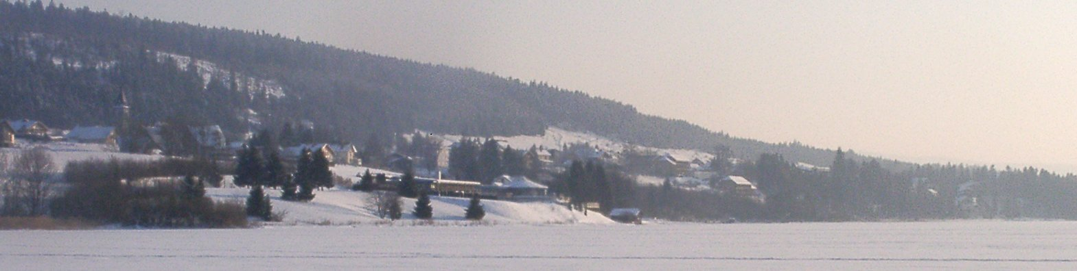 Auteur: user:Suaudeau